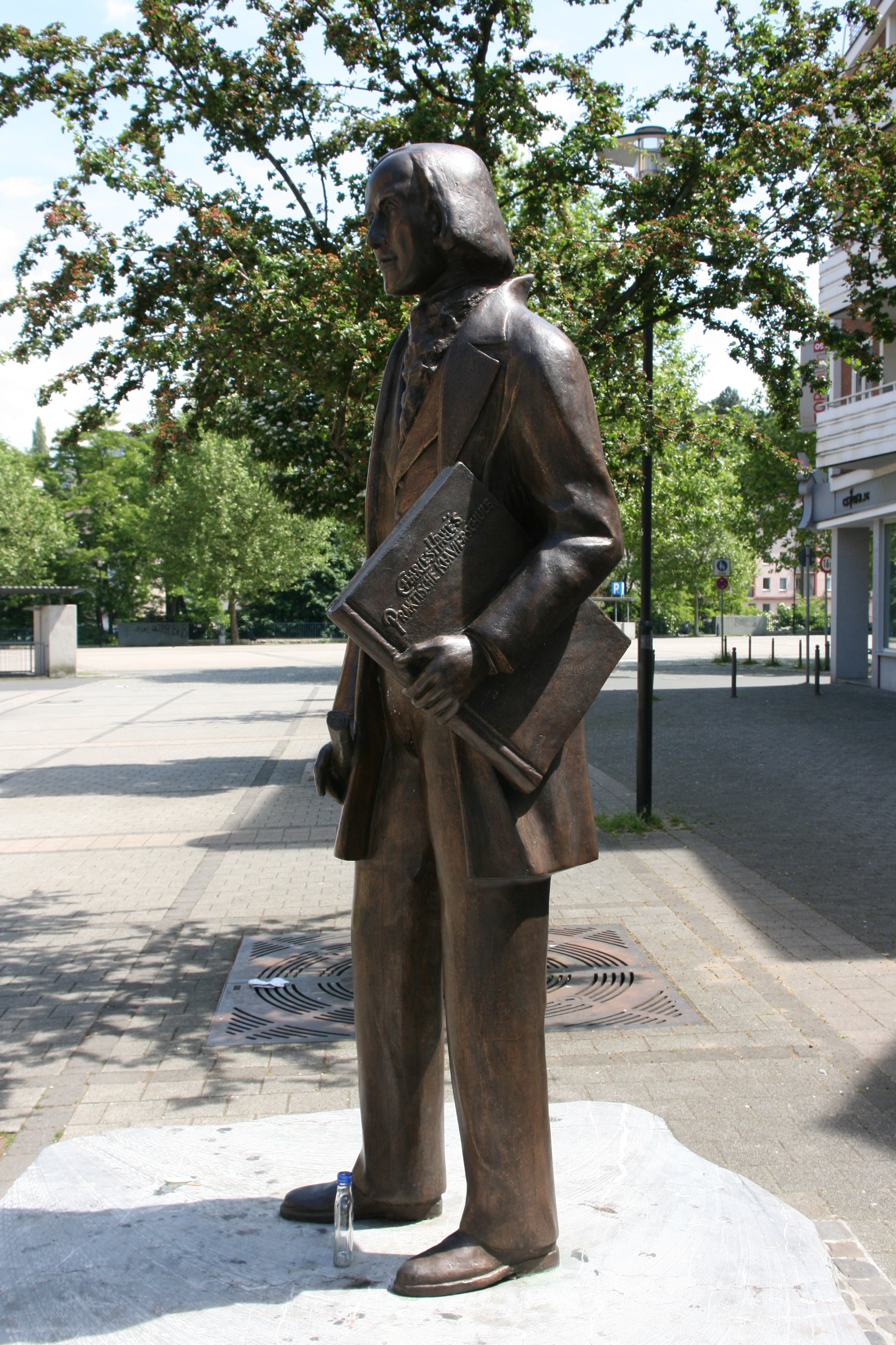 Karl-Halle-Denkmal von Uwe Will auf dem Johanniskirchplatz in Hagen